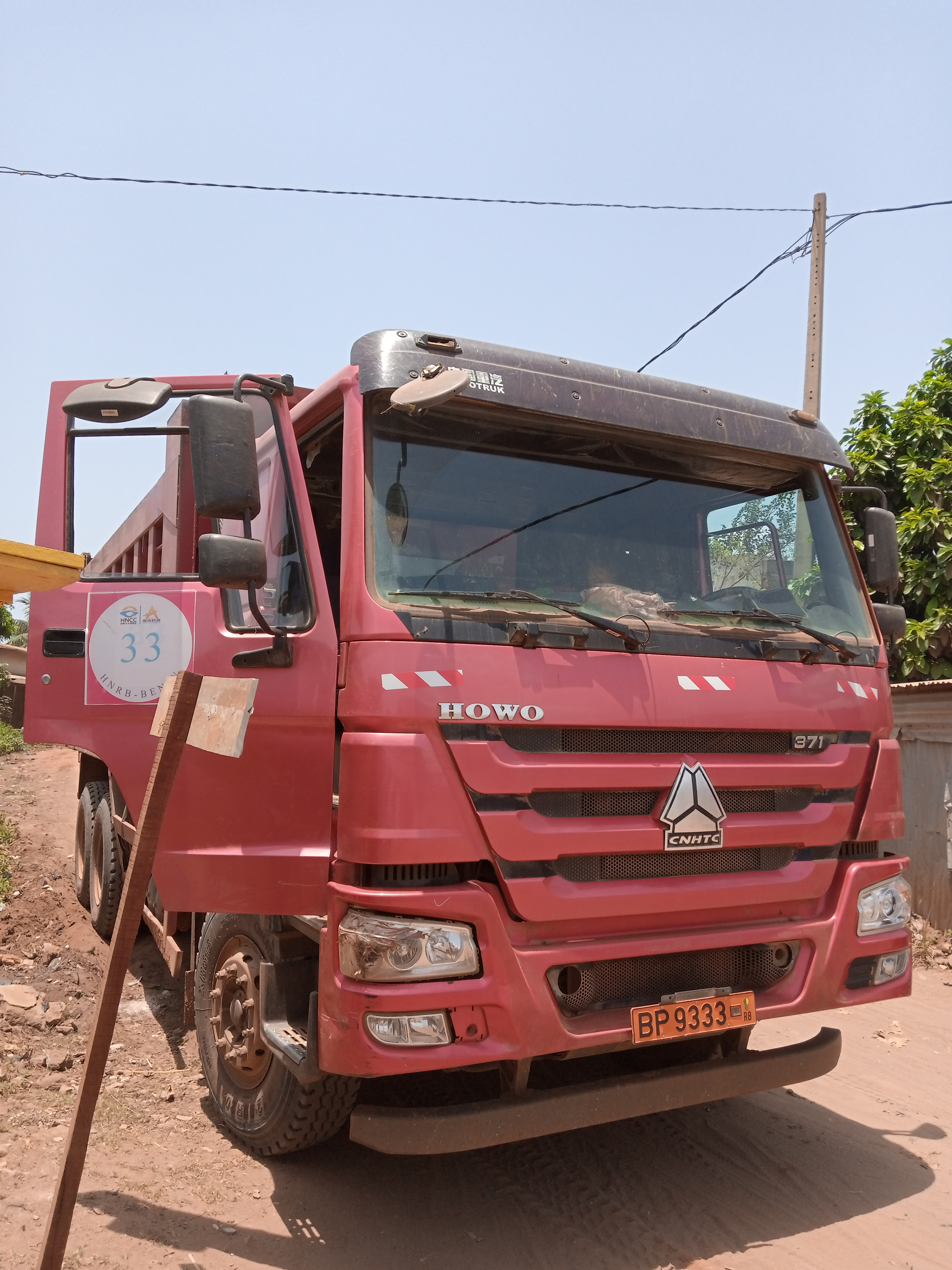 un camion de transport de sable à calavi This is an image with the theme "Africa on the Move or Transport" from: Benin